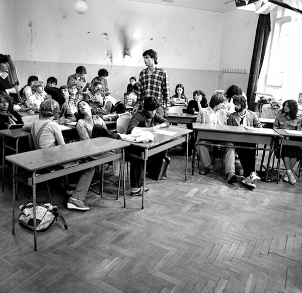 Az 1980-as Ballagás című film egyik jelenetében a 4.c osztály (középen Kornay Béla 'Kábéla' vagyis Zubornyák Zoltán)